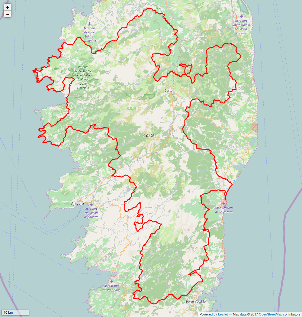 Périmètre du PNR de Corse.